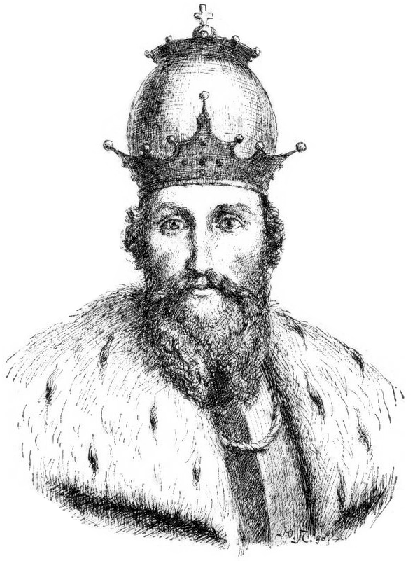 Істория України-Руси. Написав Олександер Барвіньский. 1904